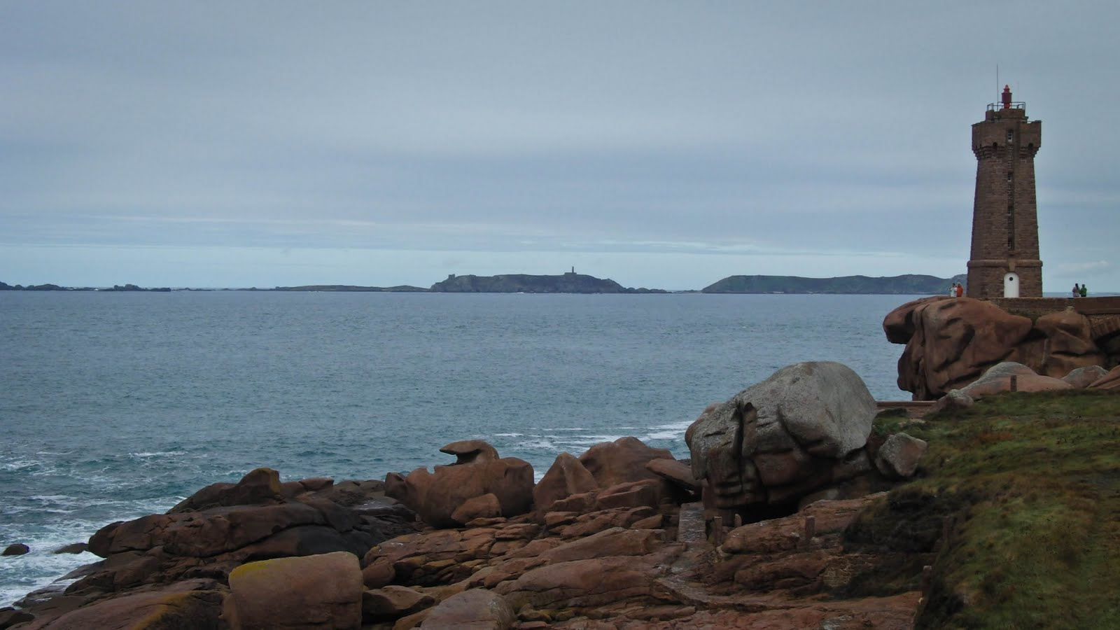 Leuchtturm Ploumenac'h mit Sept-Iles